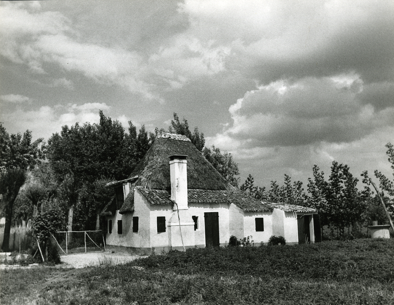 Servizio fotografico : Piove di Sacco, 1970 / Paolo Monti, Istituto di fotografia Paolo Monti. - Stampe: 5 : Positivo b/n, gelatina bromuro d'argento/ carta, 24x30. - ((Al verso di due stampe timbro a inchiostro con numero di negativo corrispondente manoscritto: "(C) Copyright/ credit to/ Istituto di Fotografia/ Paolo Monti/ 20149 Milano - Via Flavio Vegezio 17/ Neg R3741. Al verso numero di negativo corrispondente R3741, 13545. Sul coperchio della scatola, manoscritto a pennarello: "Casa rurale"